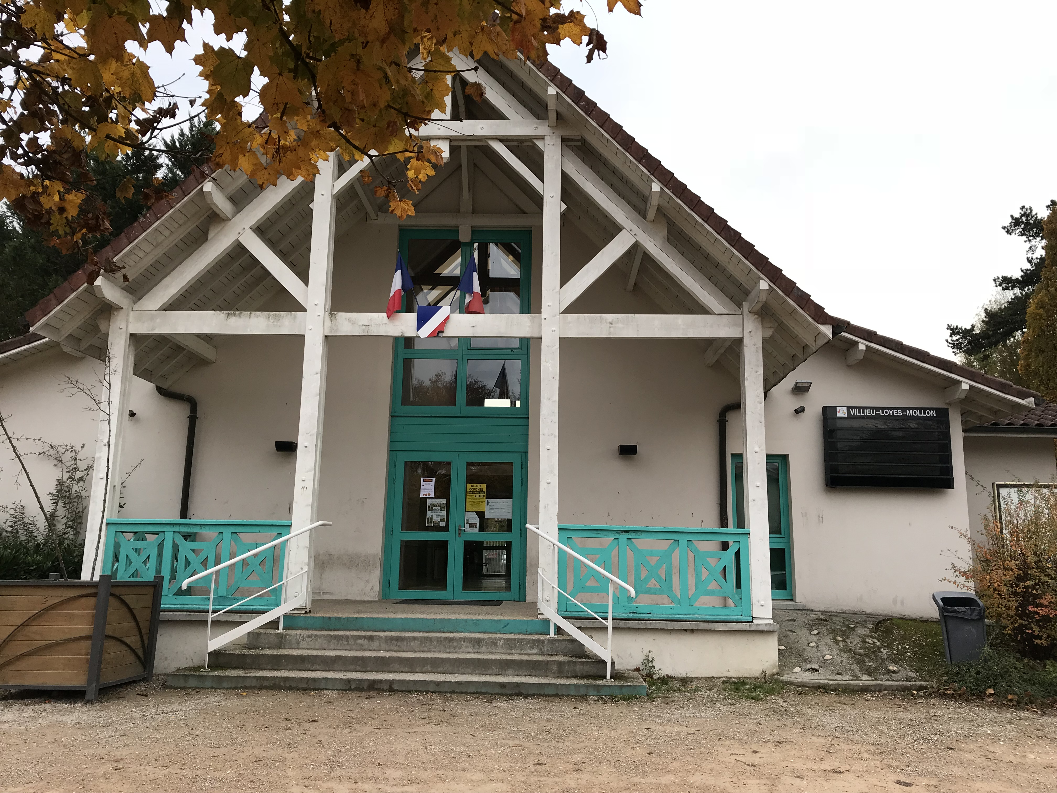 Bâtiment municipal à Mollon.